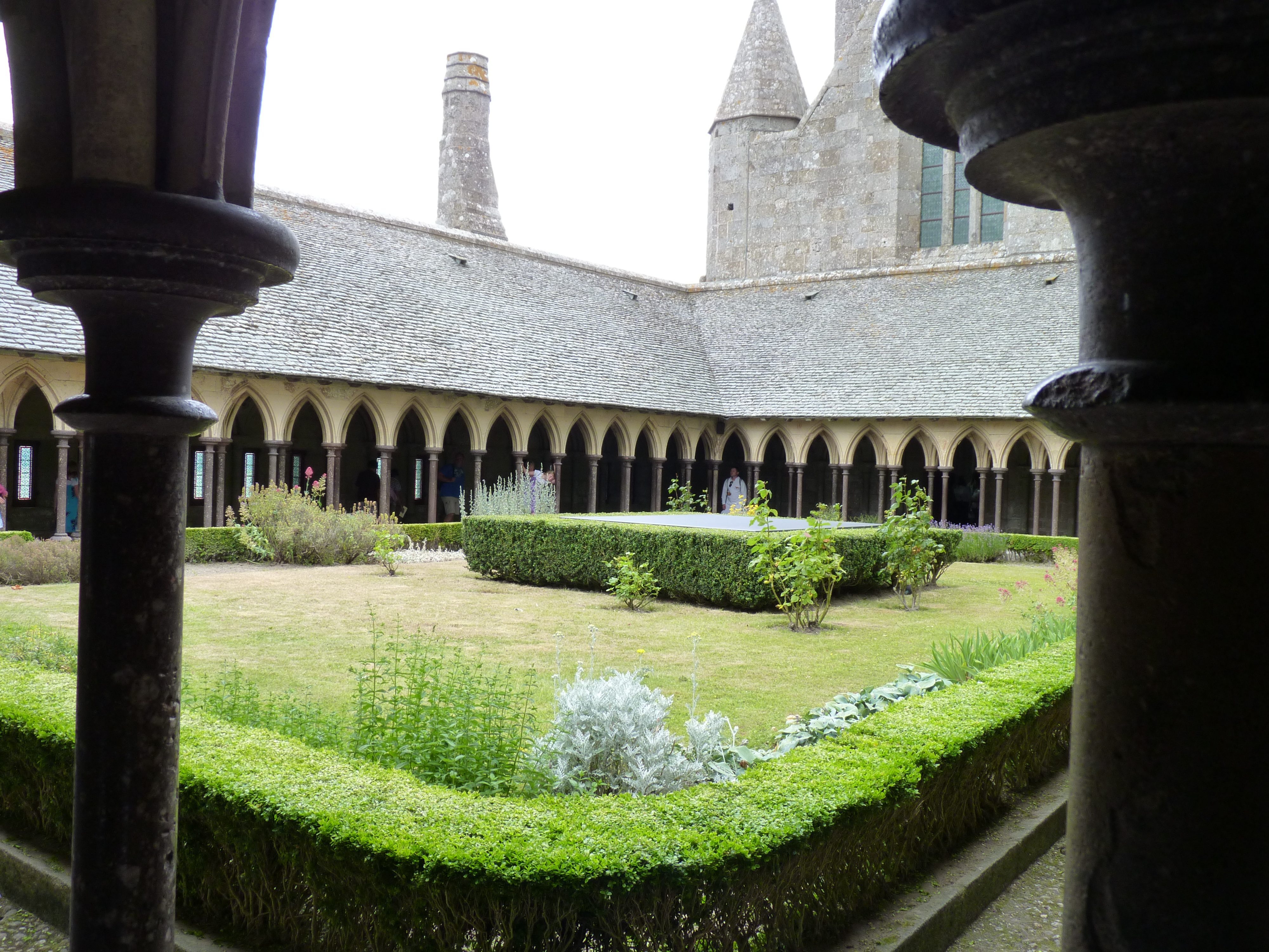 Abbaye